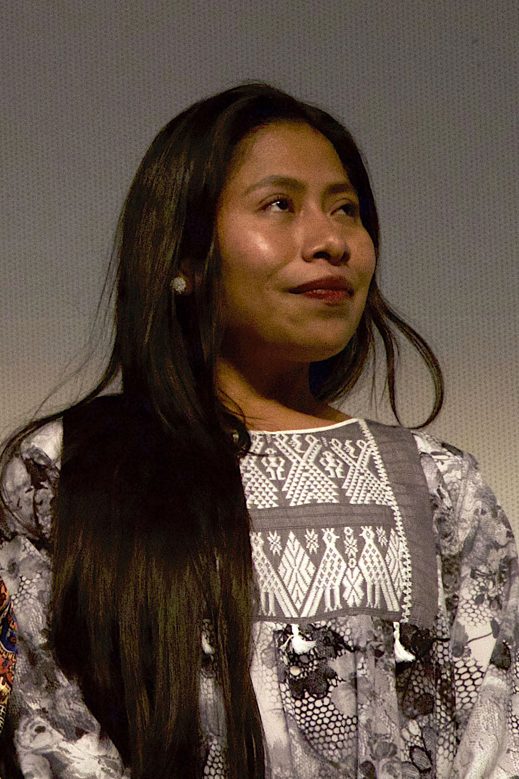 Jueves 13 de diciembre de 2018. En el Teatro de la Ciudad Esperanza Iris, se proyectó la película Roma, del director Alfonso Cuarón, que contó con la presencia José Alfonso Suárez del Real, secretario de Cultura de la Ciudad de México; Eugenio Caballero, director de arte; Yalitza Aparicio, Marina de Tavira protagonistas del film; así como personajes del electo y producción. Fotografía: Milton Martínez / Secretaría de Cultura de la Ciudad de México.